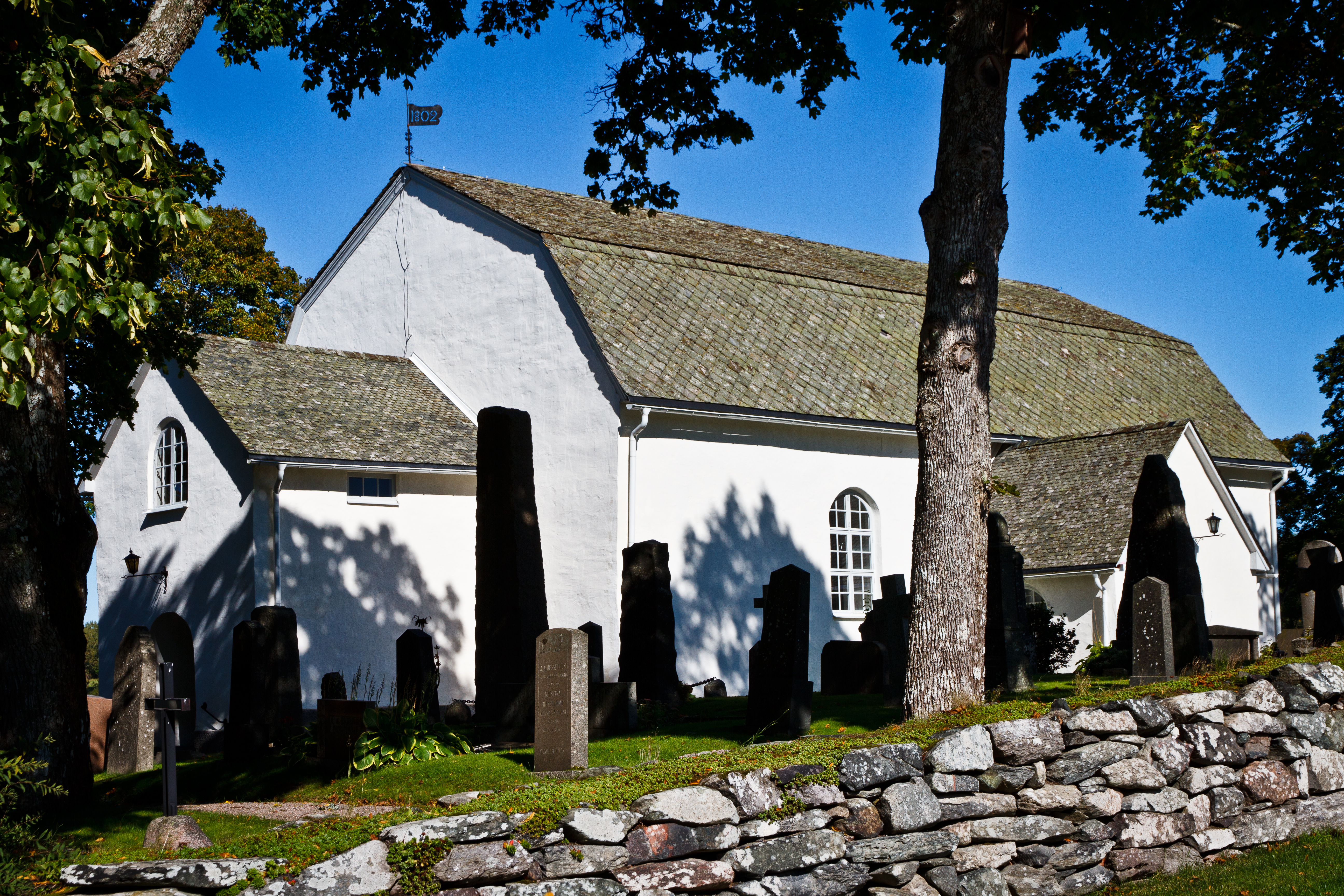 Ånimskogs kyrka (Ånimskogs Stom 1:5), Åmål